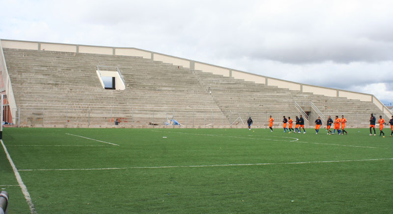 Cancha Auxiliar de Universitario de Sucre